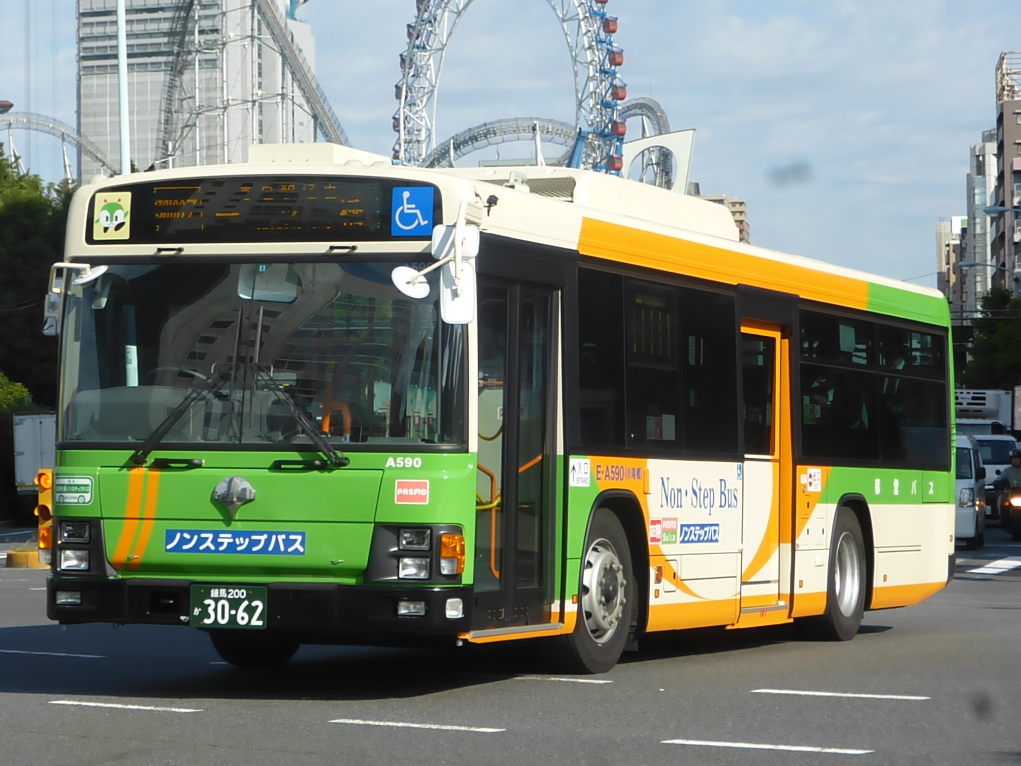 都営バス E(小滝橋)-A590号 都02乙系統 ＠後楽園バス停-水道橋駅前バス停